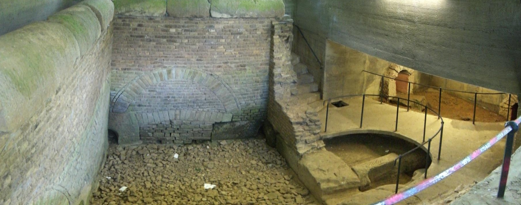 "Römische Brunnenstube" bei Kallmuth. Teil der Eifelwasserleitung. Panoramablick über Speicherbecken und Leitungen.